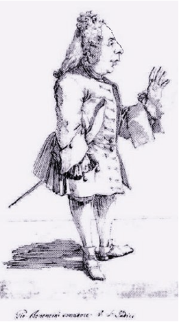 Caricatura del compositor Giovanni Bononcini por Pier Leone Ghezzi